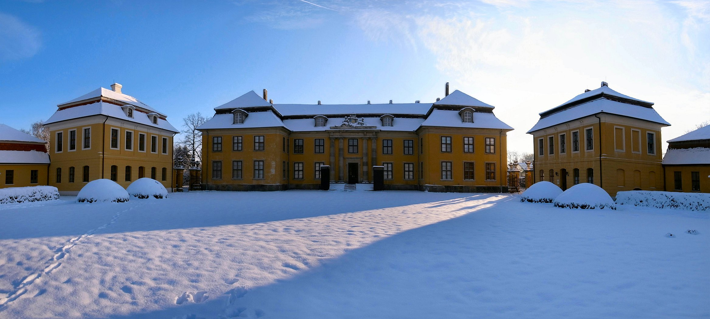 Dessau, Schloss Mosigkau